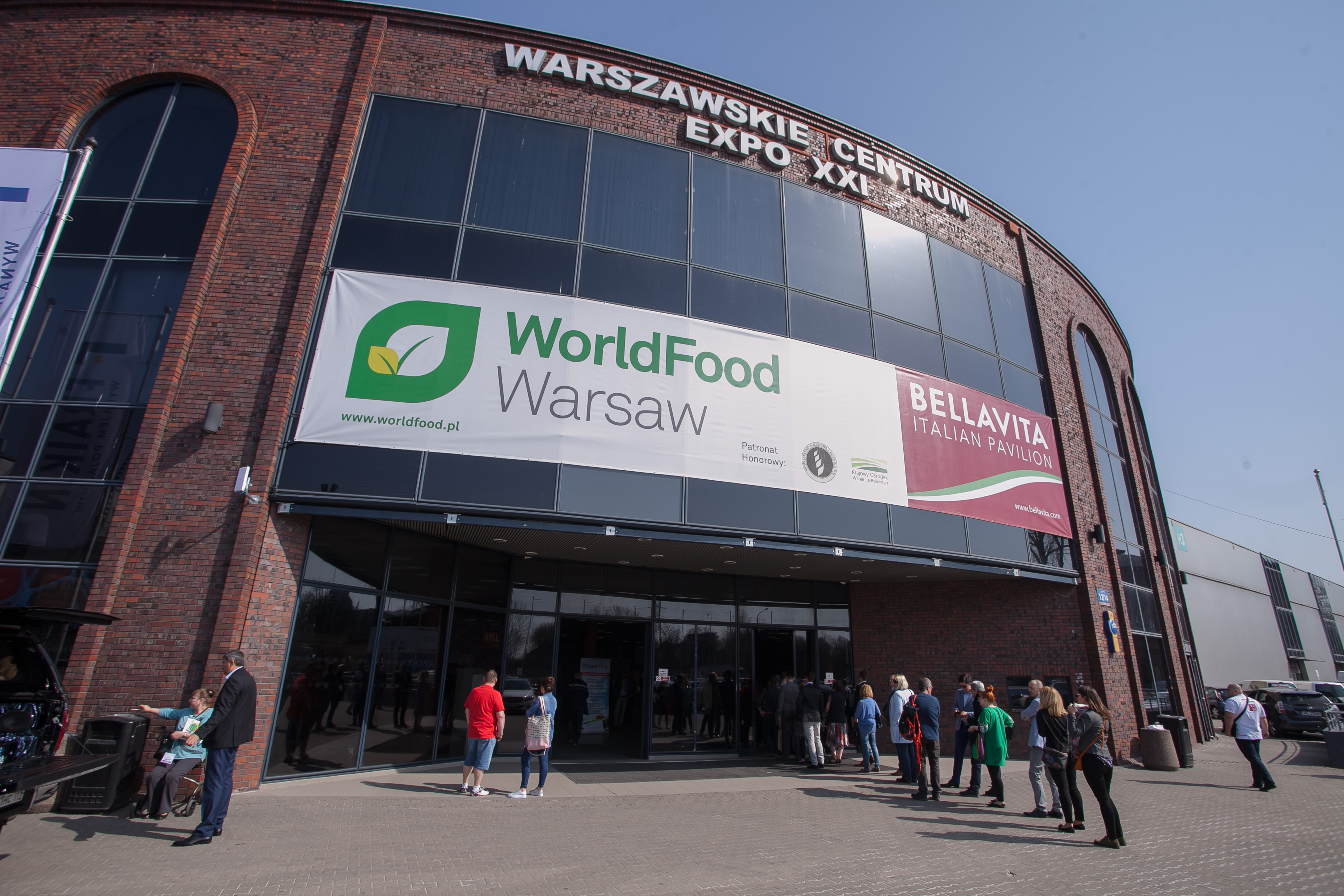 Targi WorldFood Poland - Warszawskie Centrum EXPO XXI